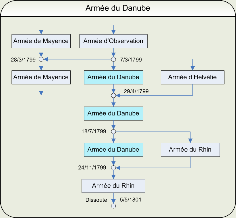 Ordinogramme de l'armée du Danube Dessin réalisé par Papier K